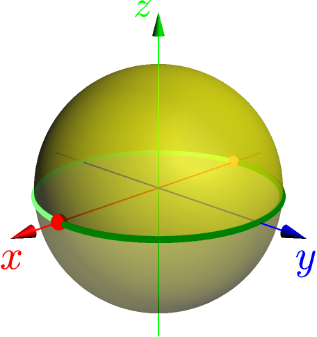 Obrázok je prevzatý z anglickej wikipédie od užívateľa Jakob.scholbach, ktorý tento obrázok publikoval s GNU Free Documentation License.